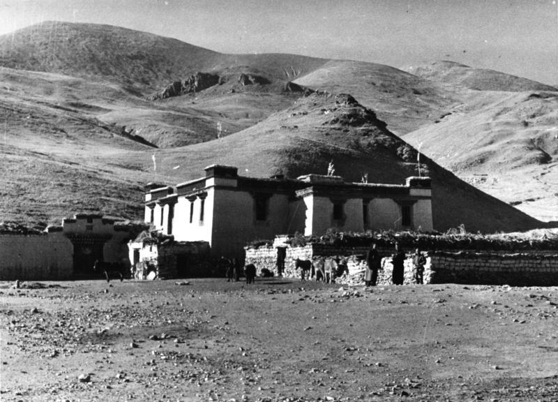 Nangkartse, tibetisches Bauernhaus in der Öde